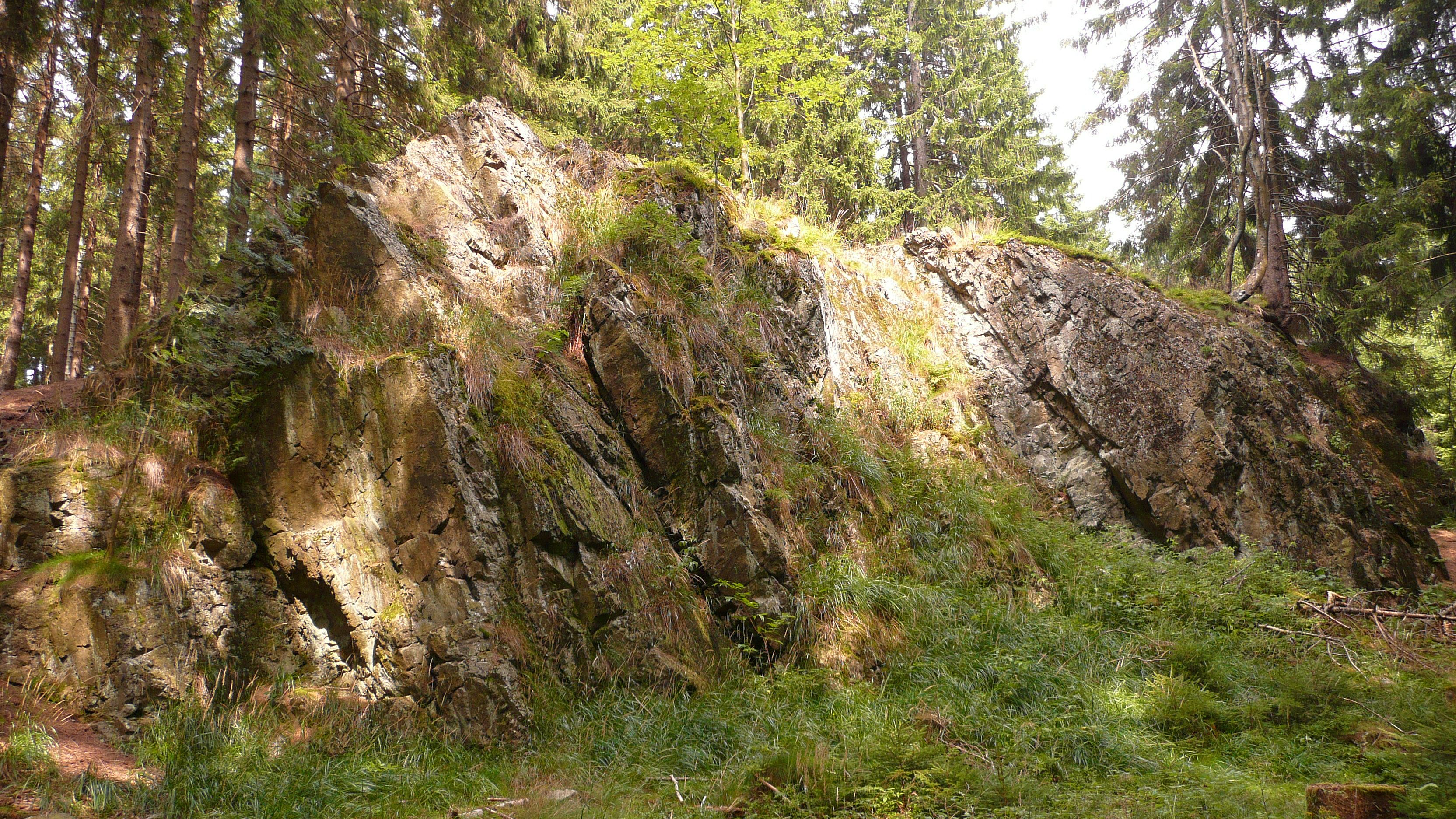 Kleine Wurmbergklippen bei Braunlage